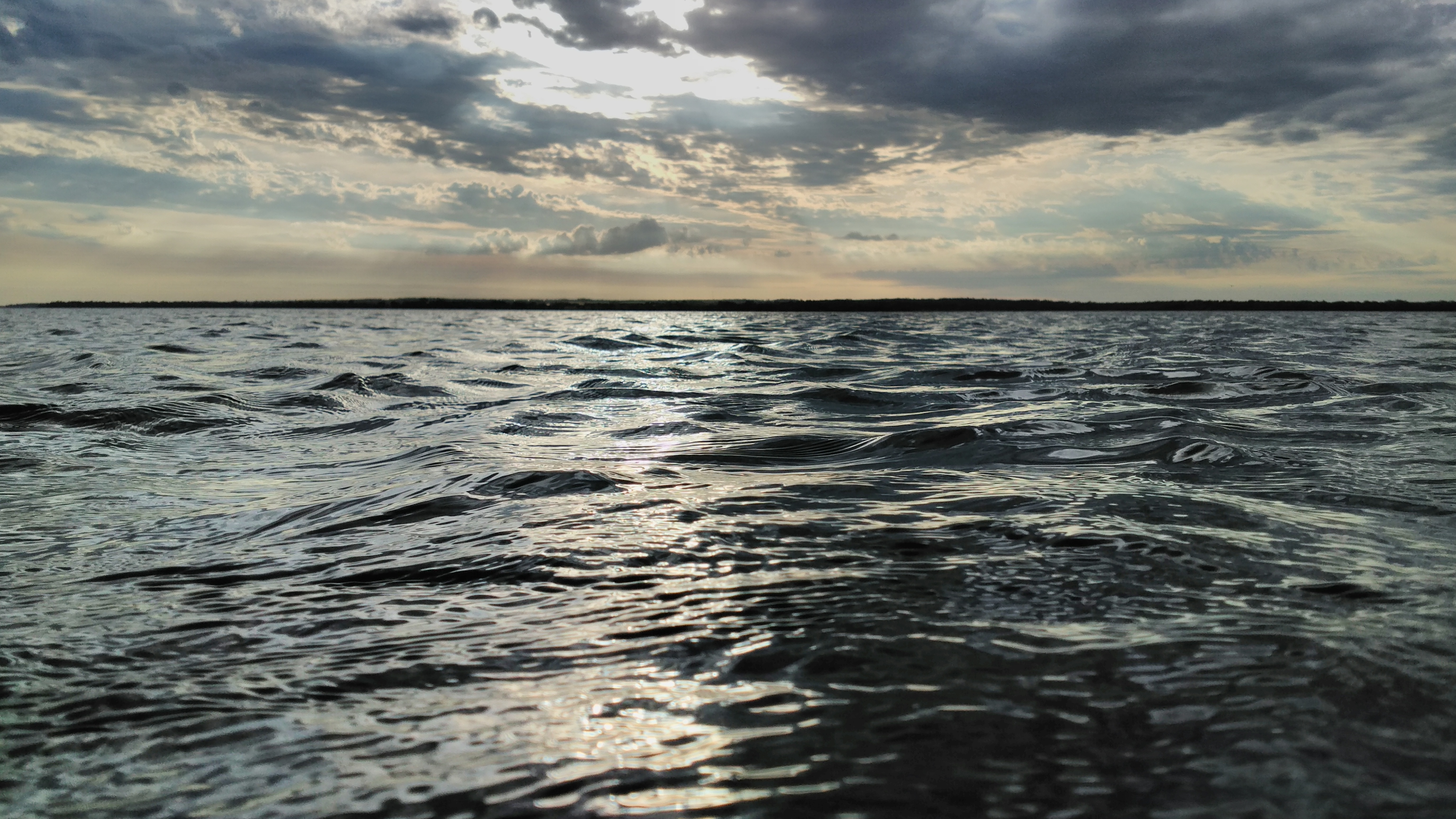 Lake Minnewaska Glenwood Minnesota